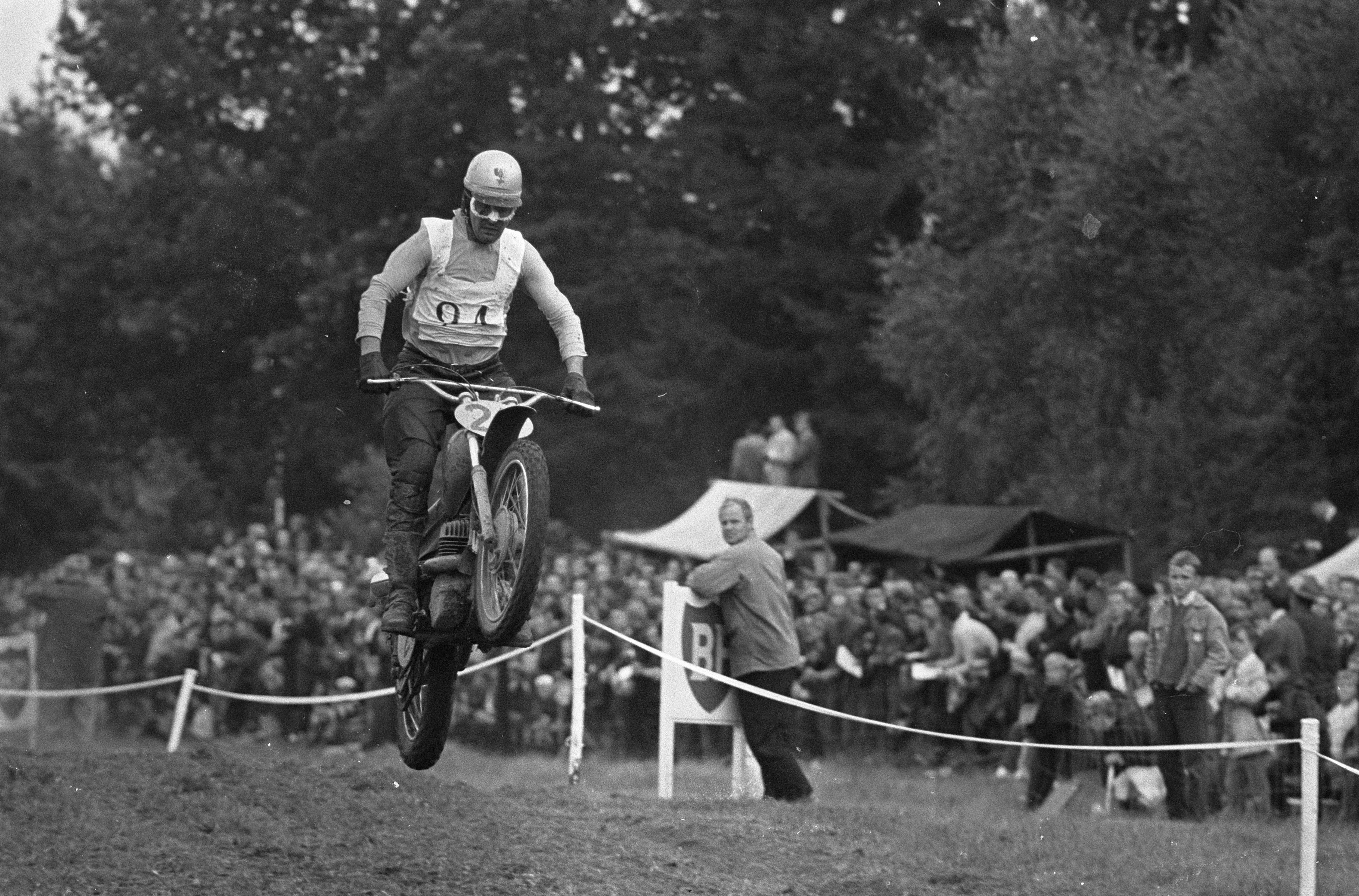 Collectie / Archief : Fotocollectie Anefo Reportage / Serie : [ onbekend ] Beschrijving : Motorcross Des Nations 1967 te Markelo. De Oost-Duitse Wk 500cc. Paul Friedrichs gaat over de springschans Datum : 3 september 1967 Locatie : Markelo Trefwoorden : Motorcross Fotograaf : Koch, Eric / Anefo Auteursrechthebbende : Nationaal Archief Materiaalsoort : Negatief (zwart/wit) Nummer archiefinventaris : bekijk toegang 2.24.01.05 Bestanddeelnummer : 920-6729